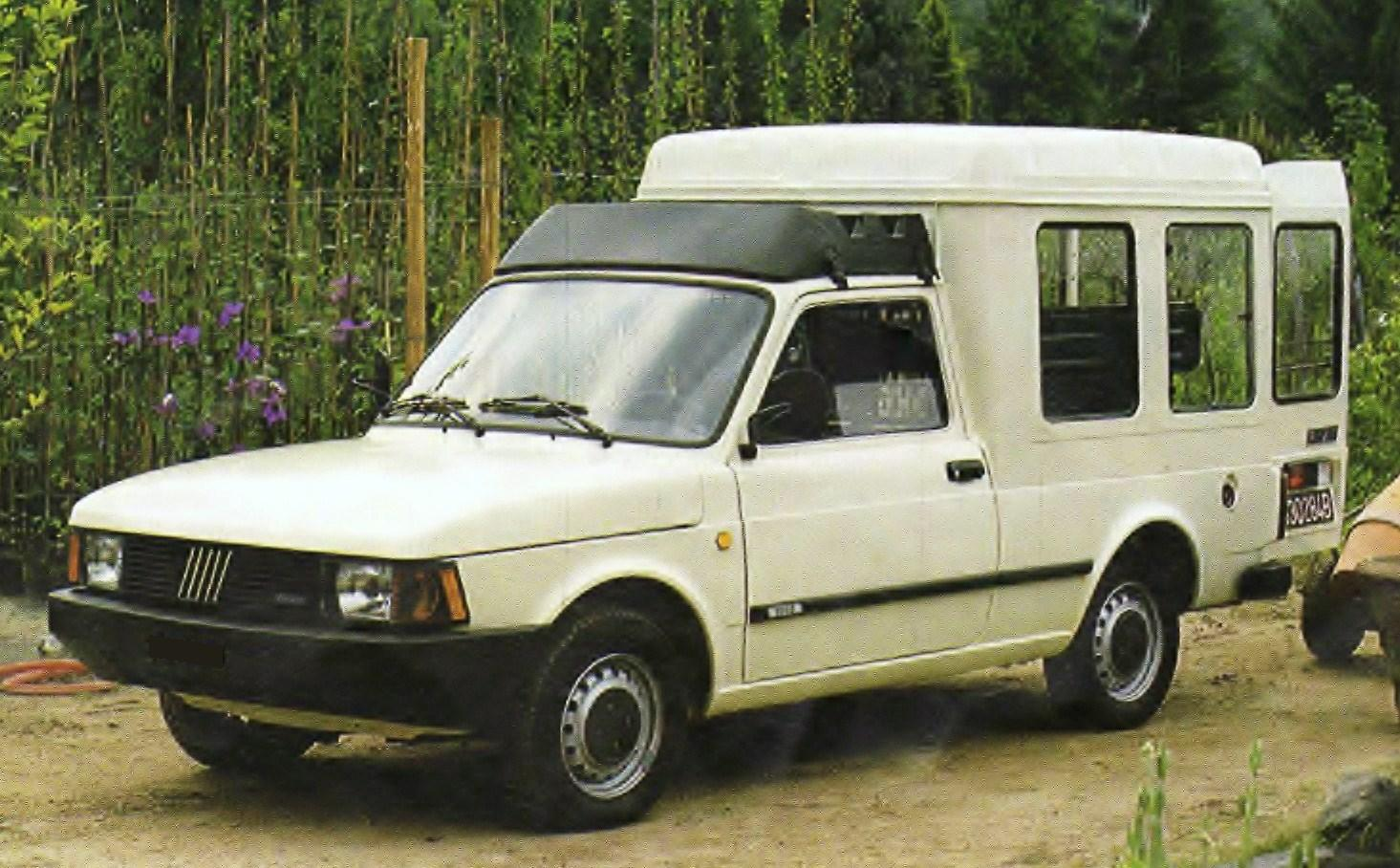 El Fiat Fiorino Furgão ano 1983